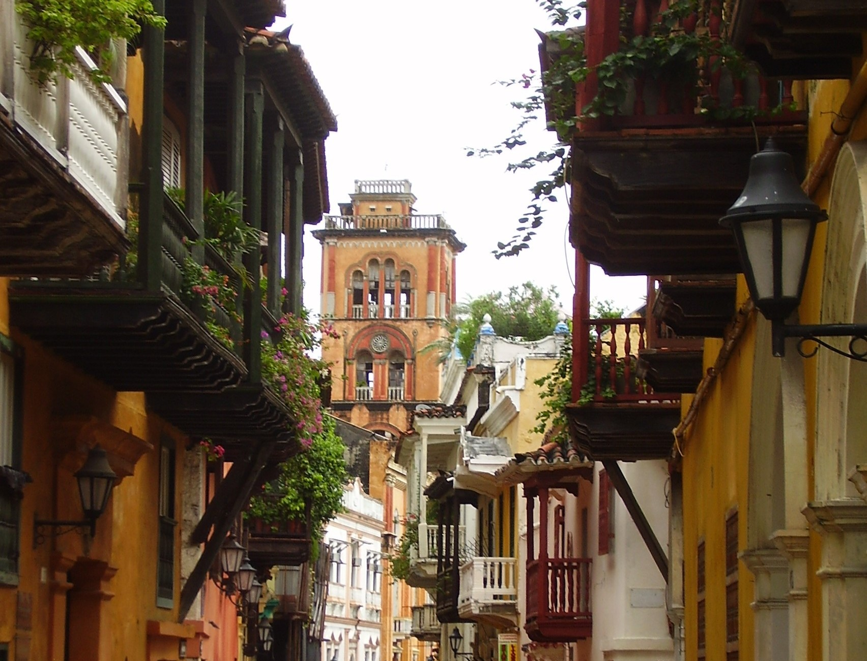 Calle de San Agustín, ciudad amurallada de Cartagena de Indias